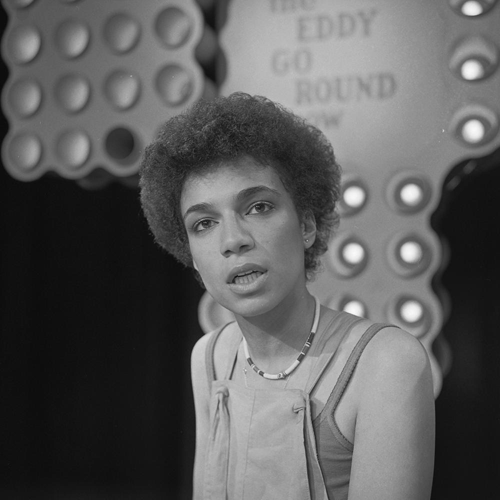 Maxine Nightingale in het Nederlandse televisieprogrammaThe Eddy Go Round Show in 1976